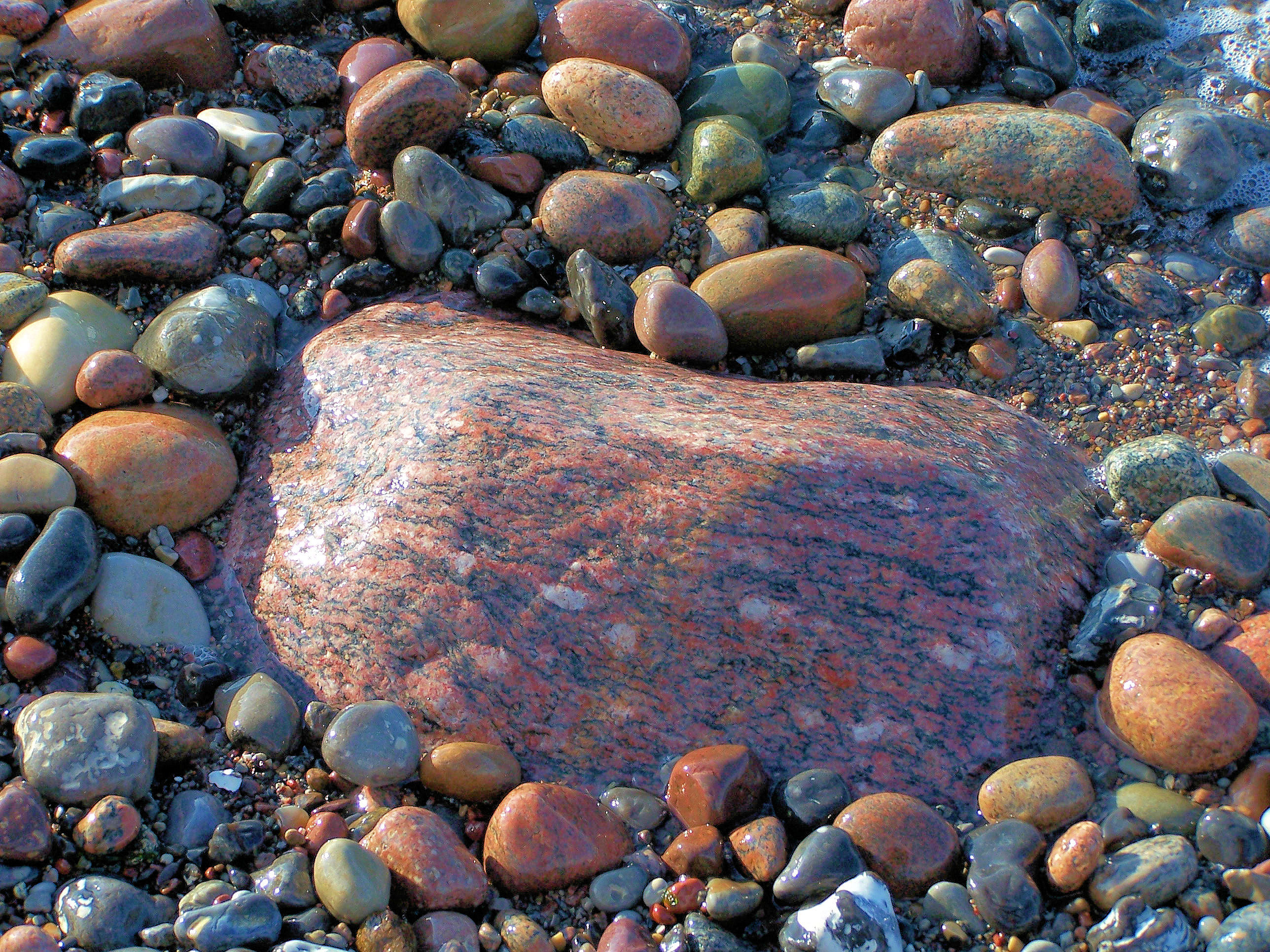 Granitfindling und Geröll an der Steilküste Stoltera, bei Warnemünde (Rostock), Mecklenburg